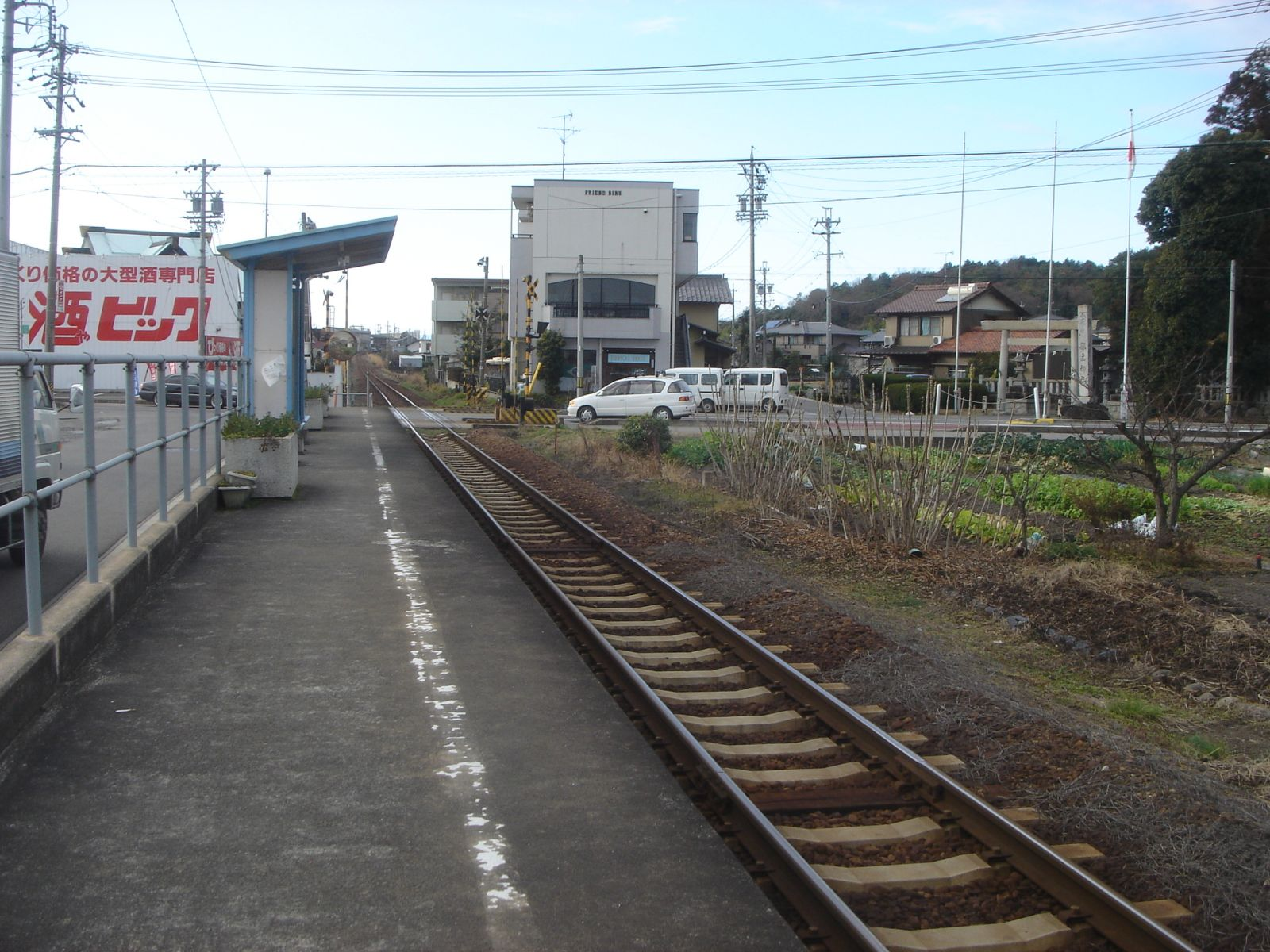 Maehira-koen Station (長良川鉄道越美南線、前平公園駅）,Minokamo,Gifu,Japan(岐阜県美濃加茂市)で撮影。